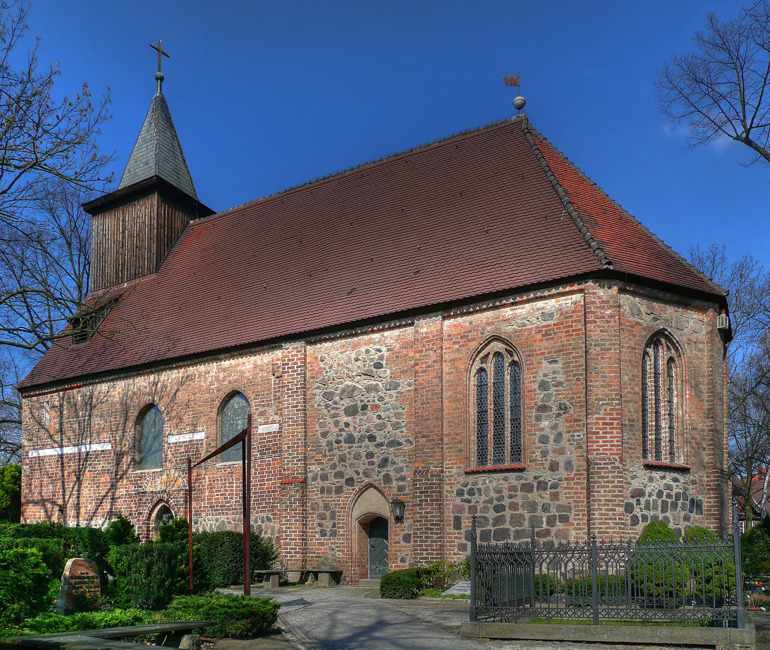 St.-Annen-Kirche in Berlin-Dahlem (Dorfkirche Dahlem)